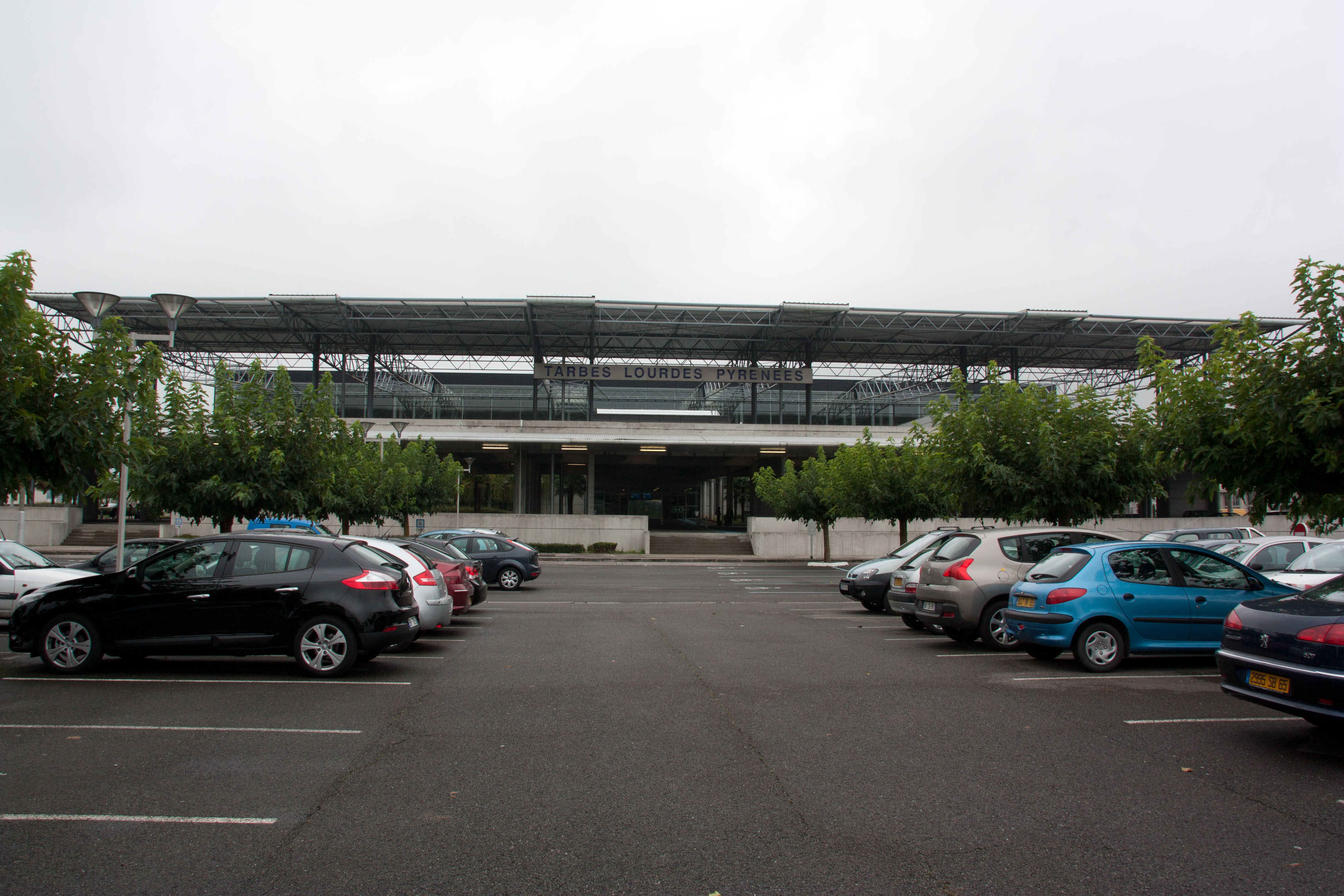 Aéroport de Tarbes-Lourdes-Pyrénées - Vue extérieure de l'aérogare (vue depuis la voirie)